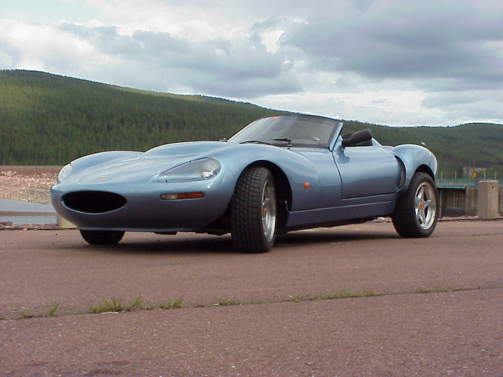 1997 Ginetta G34 photographed in Trängslet, Älvdalen, Sweden in 1998.